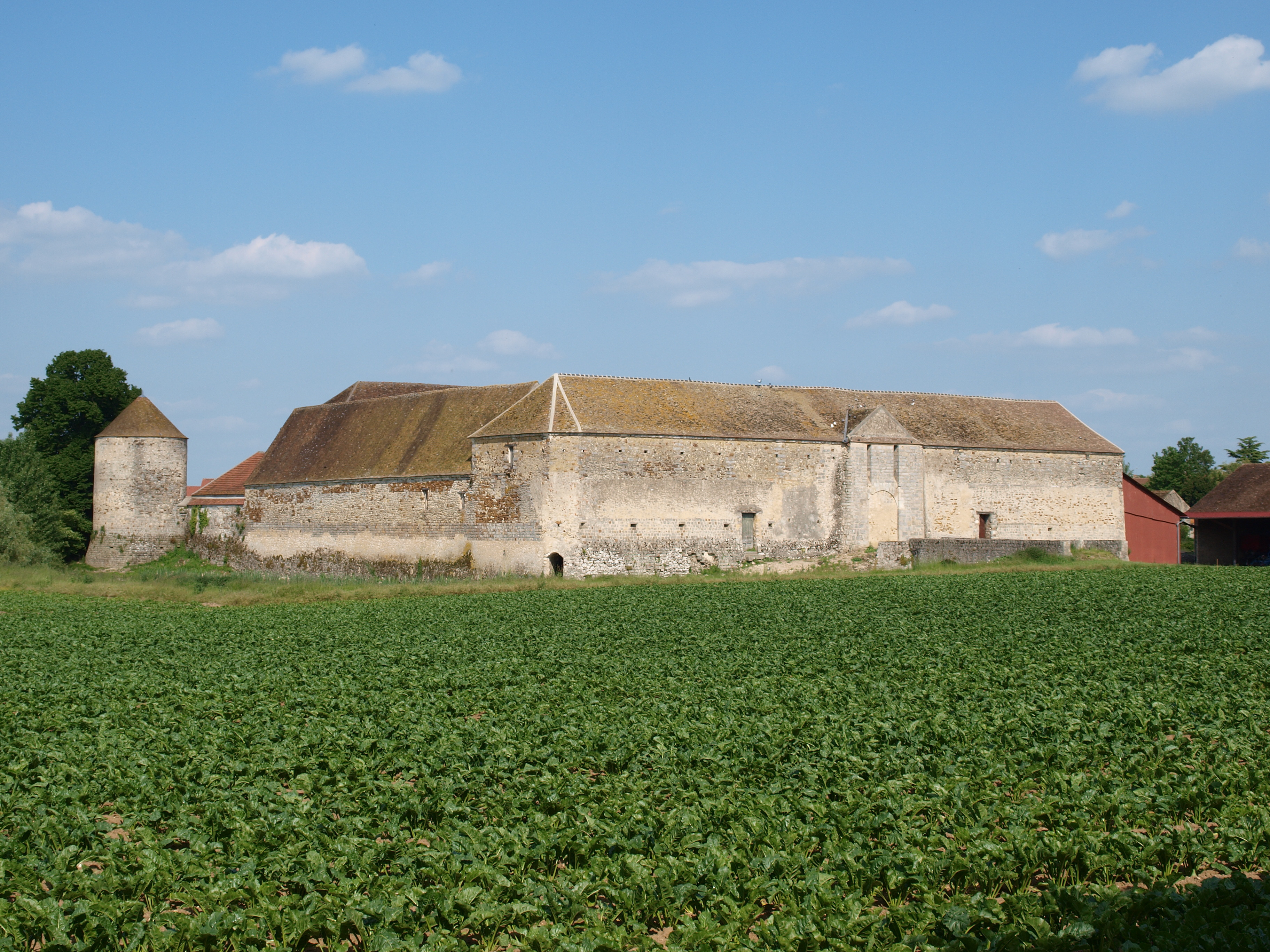 Château d'Esmans (Seine et Marne, France)